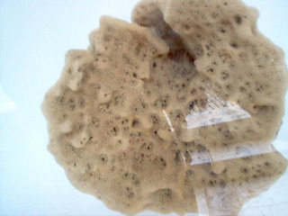 Spužva u fazi prerade. Fotografirana u samostanu Sv.Križa na Krapnju, Šibenik, Hrvatska.